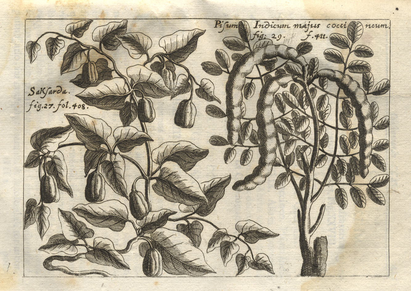 Illustration zu Hermann Niklas Grims Arbeit "Pisum Indicum majus coccineum".